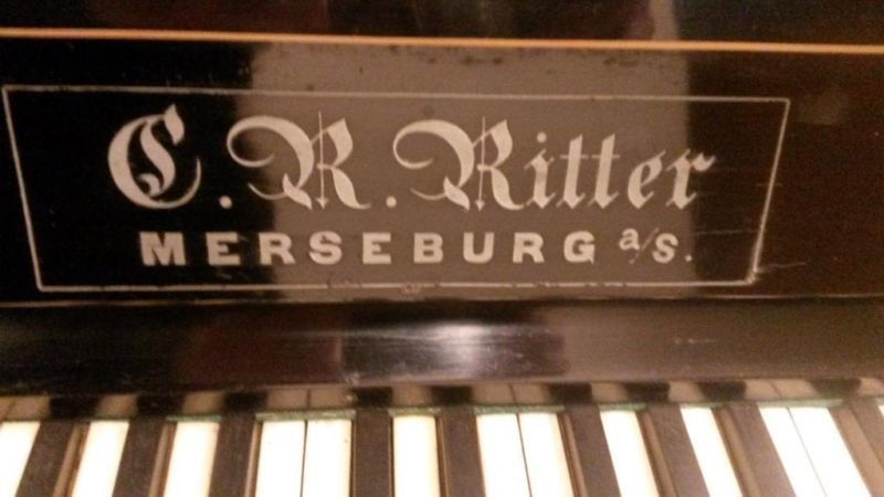 Ritter Klavier um 1880 mit Signatur im Tastaturdeckel (aus Merseburg!)